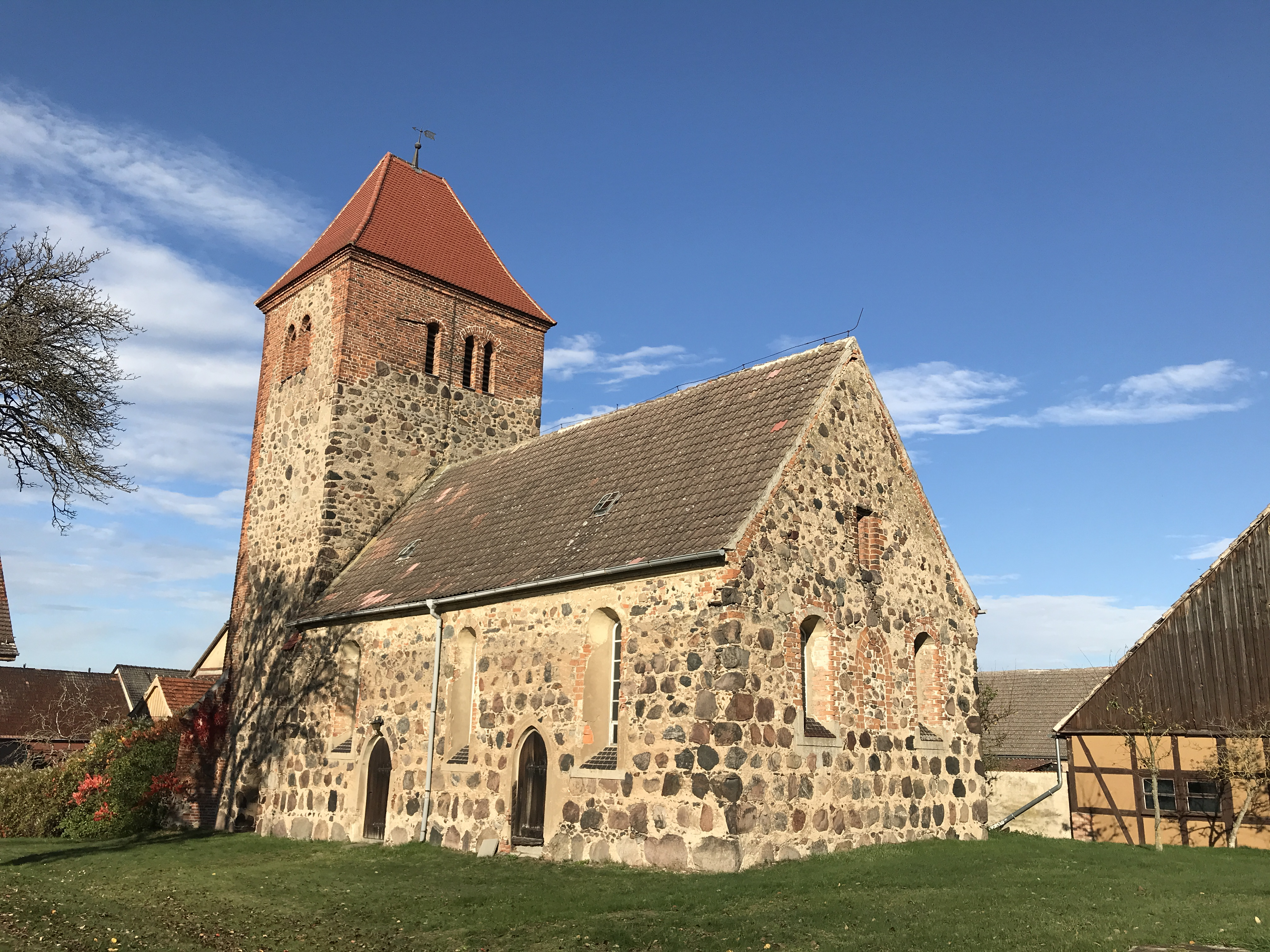 Die Dorfkirche Hohenseefeld in der Gemeinde Niederer Fläming im Landkreis Teltow-Fläming ist eine Feldsteinkirche aus dem 13. Jahrhundert. Im Innern steht unter anderem ein hölzerner Kanzelaltar, der Ende des 19. Jahrhunderts unter Verwendung historischer Teile entstand.